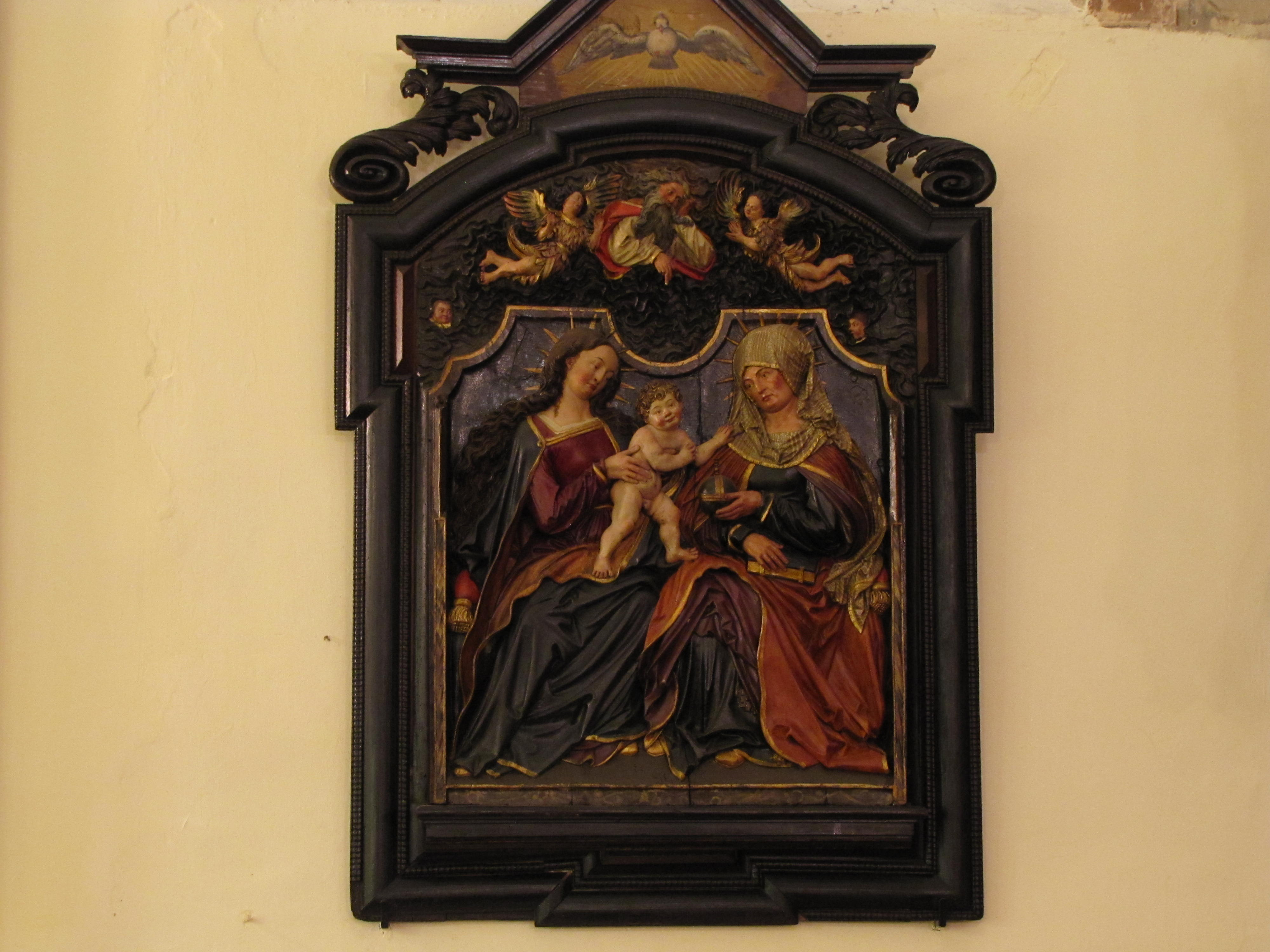 Alsace, Bas-Rhin, Église protestante Saint-Pierre-le-Vieux de Strasbourg (PA00085031). Relief "La Sainte Parenté" (1520)